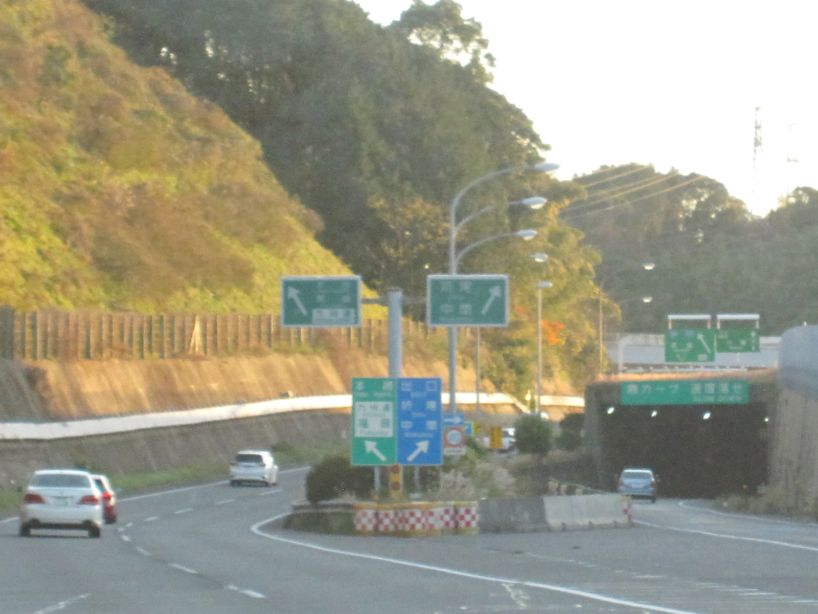 黒崎出入口の折尾・中間方面出口との分岐。